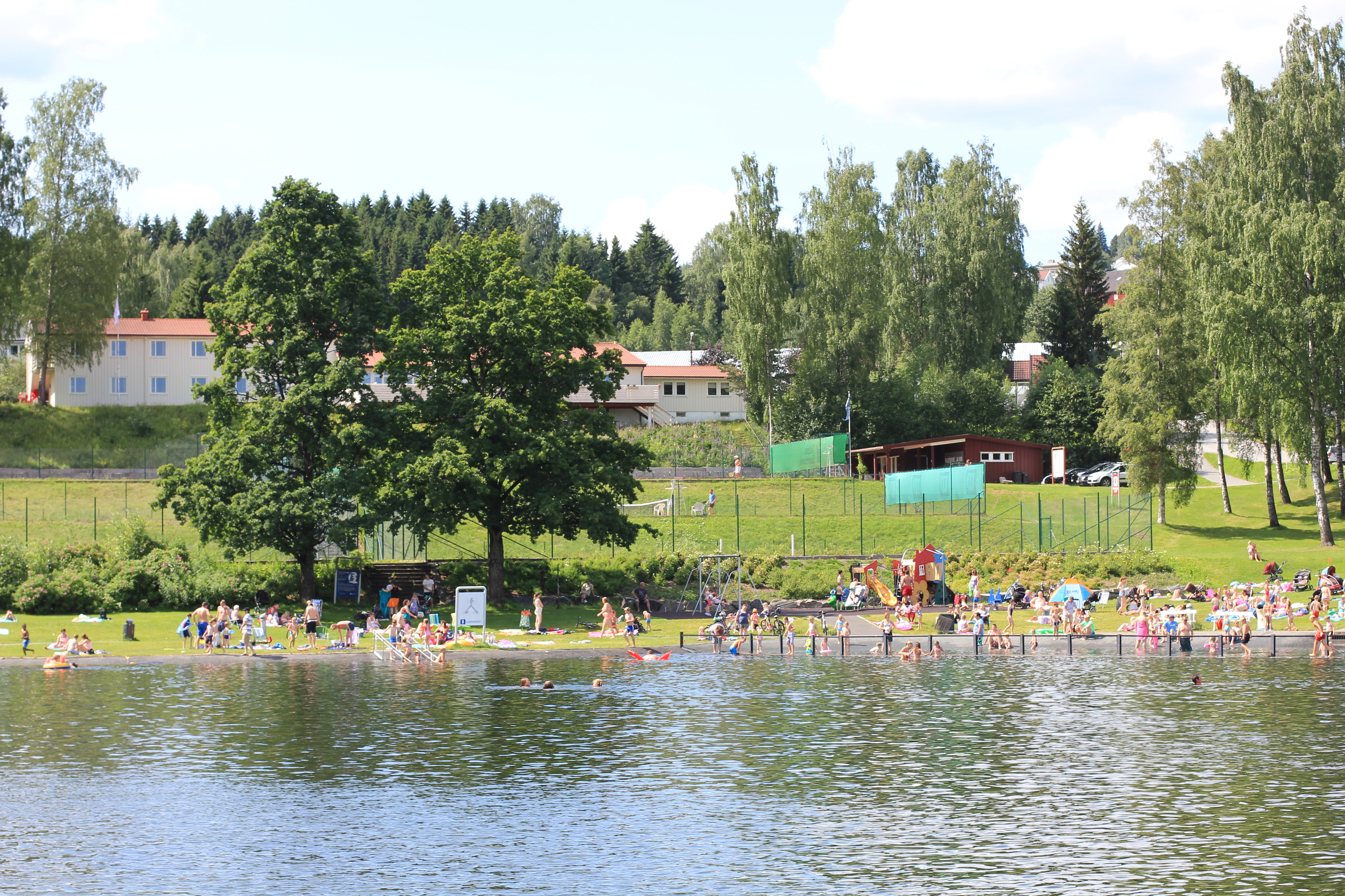 Fastland med Hovdetun vandrerhjem, Gjøvik.